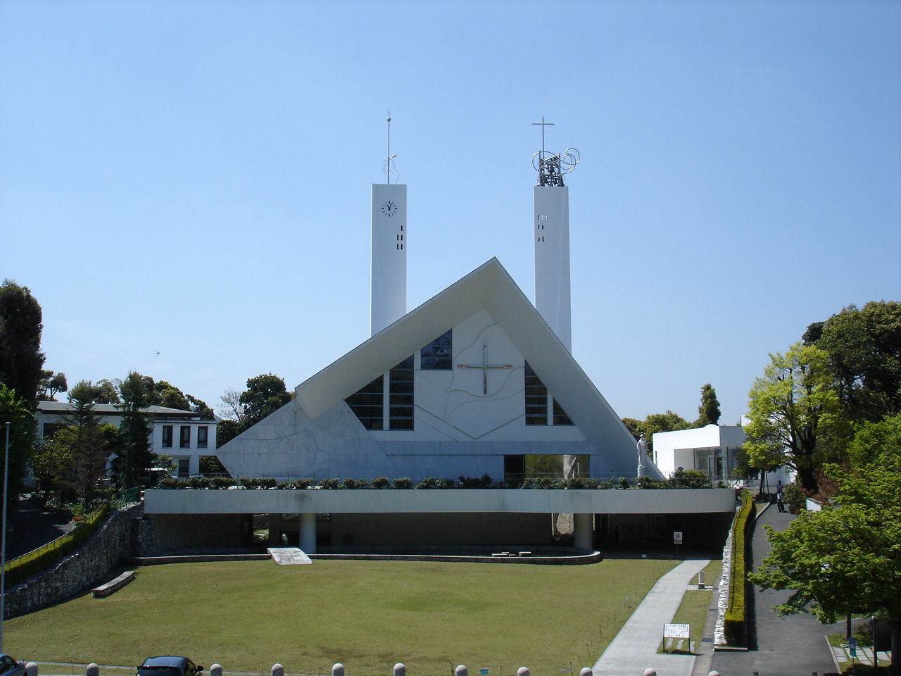 山口サビエル記念聖堂（2009年4月18日、Wiki708撮影）